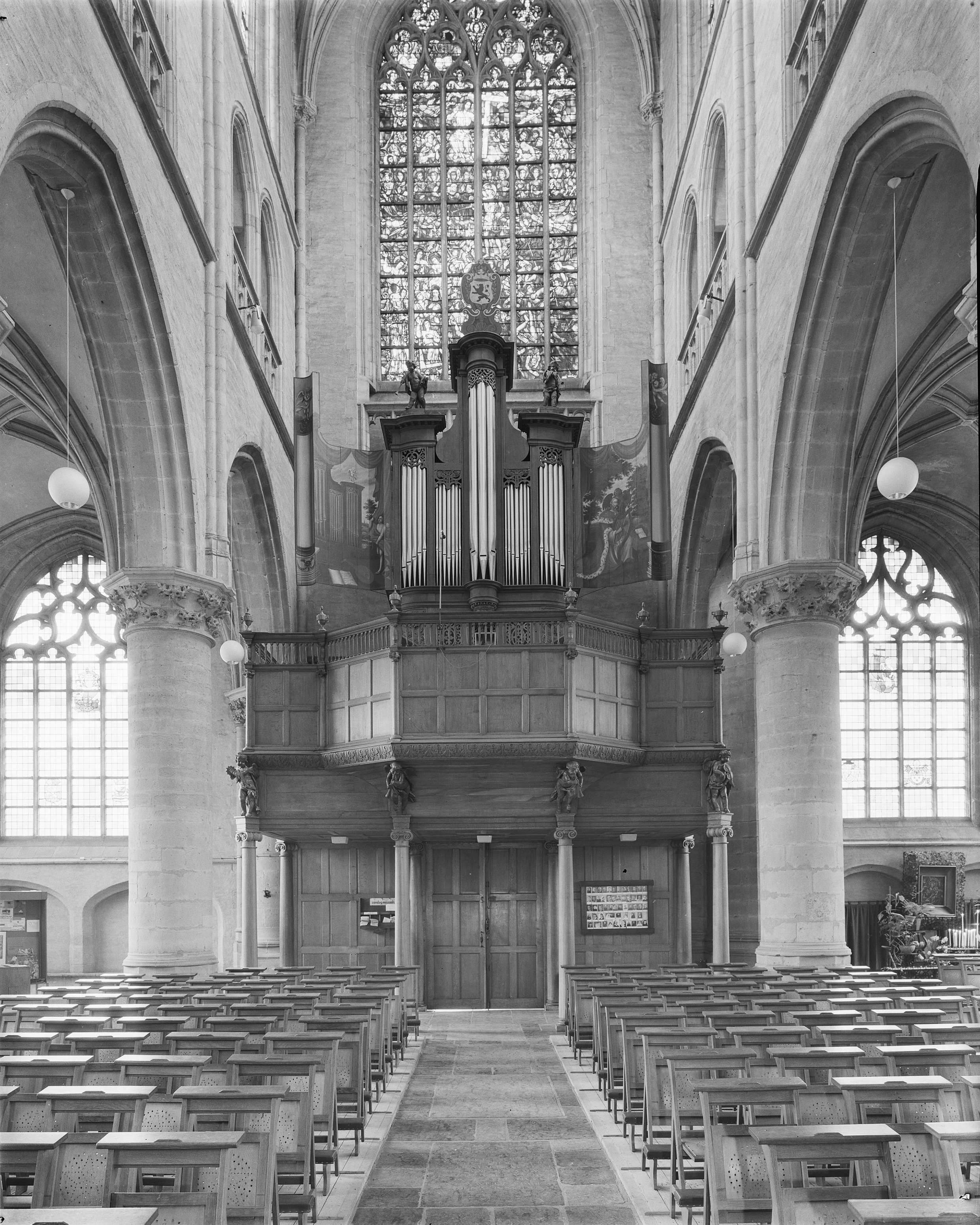 Grote Kerk: orgel